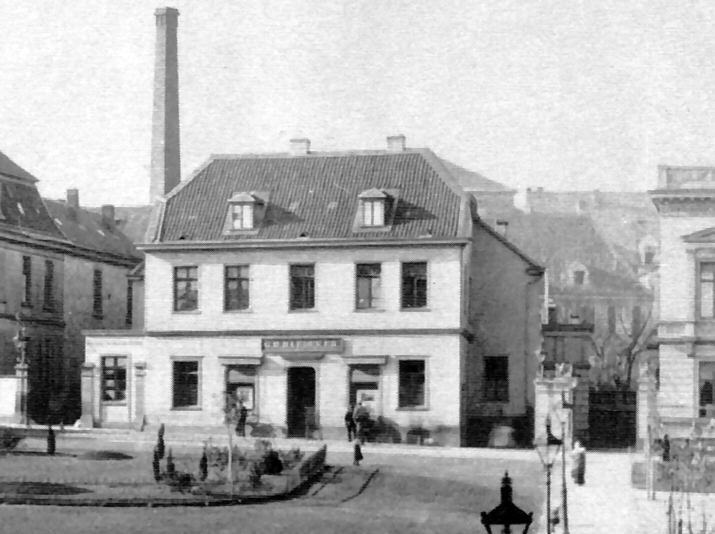 alte Buchhandlung und Druckerei Baedeker in Essen, vormals Von Harrach'sche Kurie (Wohnhaus Essener Stiftsdamen); Standort am westlichen Burgplatz an der Burgstraße, heute Kettwiger Straße